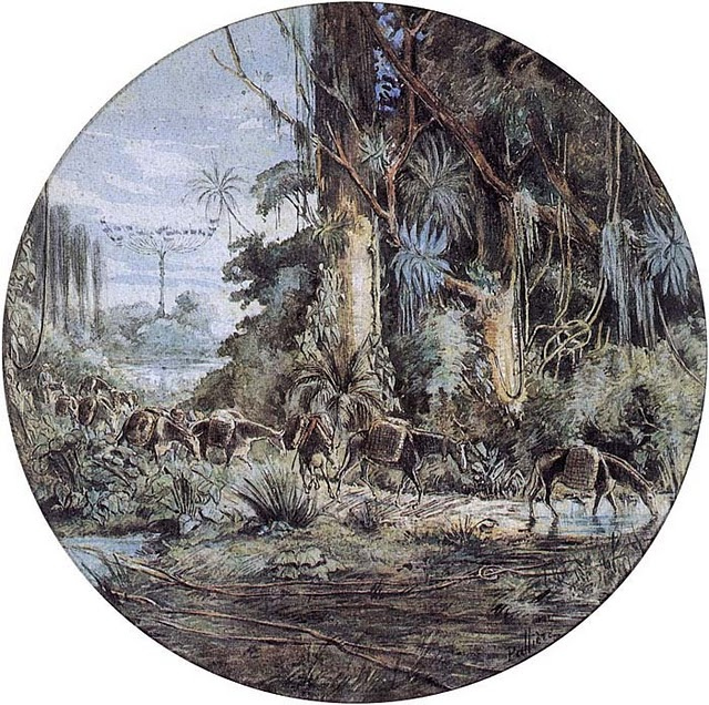 Descendo a Serra do Mar com tropas de erva mate, gravura de João Leão Pallière (1823 - 1887) da obra de Álbum de Cenas Americanas de 1864.OBS.: Como base em 2011 = 124 anos de falecimento do autor.